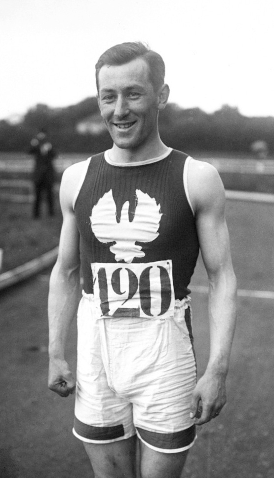 28-7-12, Colombes, championnats militaires [d'athlétisme], Schurrer [vainqueur du 100 et du 400 mètres] : [photographie de presse] / [Agence Rol]